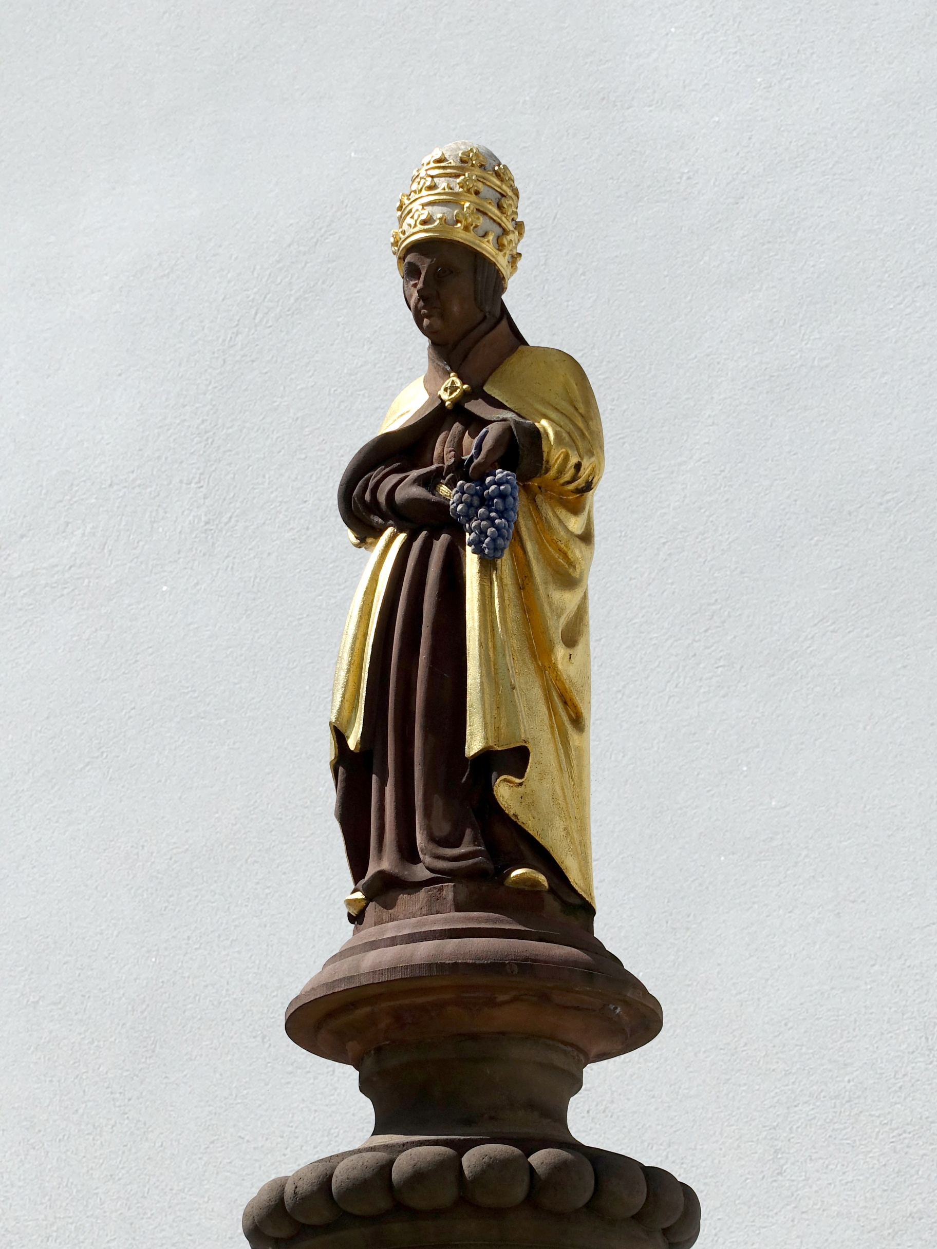 Bereits seit 1448 steht der St. Urbans-Brunnen am selben Ort. 1873 musste das Original wegen des schlechten Zustandes aber durch eine Kopie ersetzt werden. Der Brunnen wurde bei seiner Aufstellung von den Reb- und Weinleuten als Schutzpatron lebhaft begrüsst. Man vermutet, dass die Figur von Papst Urban I. stammt, der von 222 bis 230 auf dem heiligen Stuhl sass und einen Märtyrertod starb. Dass es sich bei der Plastik um einen Papst handeln muss, ist an der dreiteiligen Papstkrone zu erkennen. Papst Urban I. hat seinen eigenen Festtag inmitten der Zeit der Rebenblüte, nämlich am 25. Mai. Um 1830 hörte aus unerfindlichen Gründen der Brauch auf, die Plastik an diesem Festtag zu verkleiden, sie mit Blumen zu schmücken und in die eine Hand ein Glas Weiss- und in die andere ein Glas Rotwein zu geben. Regnete es den ganzen Tag nicht in diesen Wein, so versprach man sich ein gutes Weinjahr. 1911 wurde die zweite Nachbildung des Urban ins Historische Museum abgegeben.